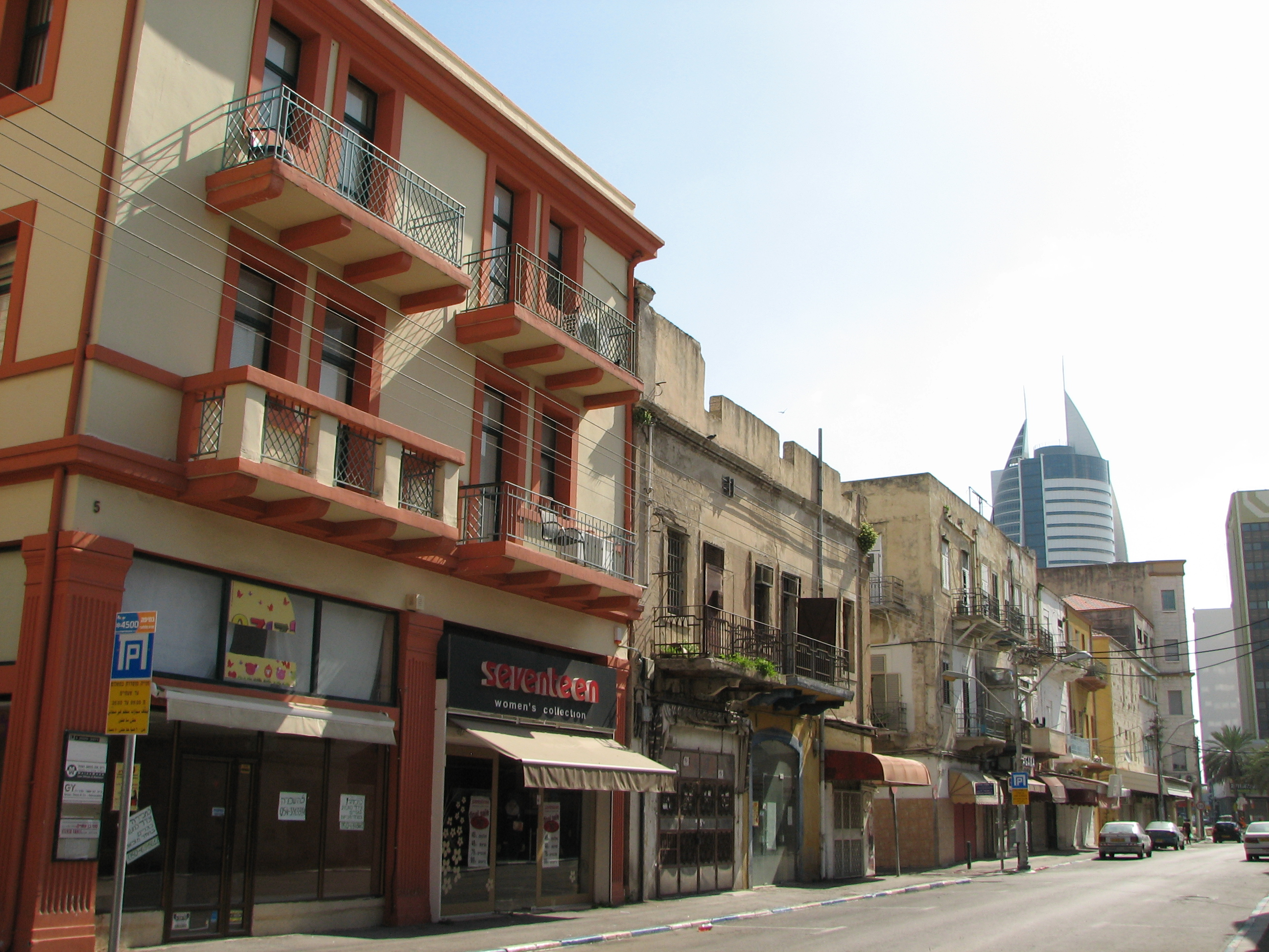 The old commercial center in Jaffa Street, Haifa. Israel המרכז המסחרי הישן. נפתח בשנת 1927, בשטח שהשתרע מרחוב יפו לכוון הים מול כיכר חמרה. זה היה המבנה הראשון בחיפה אשר יועד מלכתחילה למסחר. בחלק מהרחובות פעל במשך שנים רבות שוק שנקרא "השוק הטורקי".